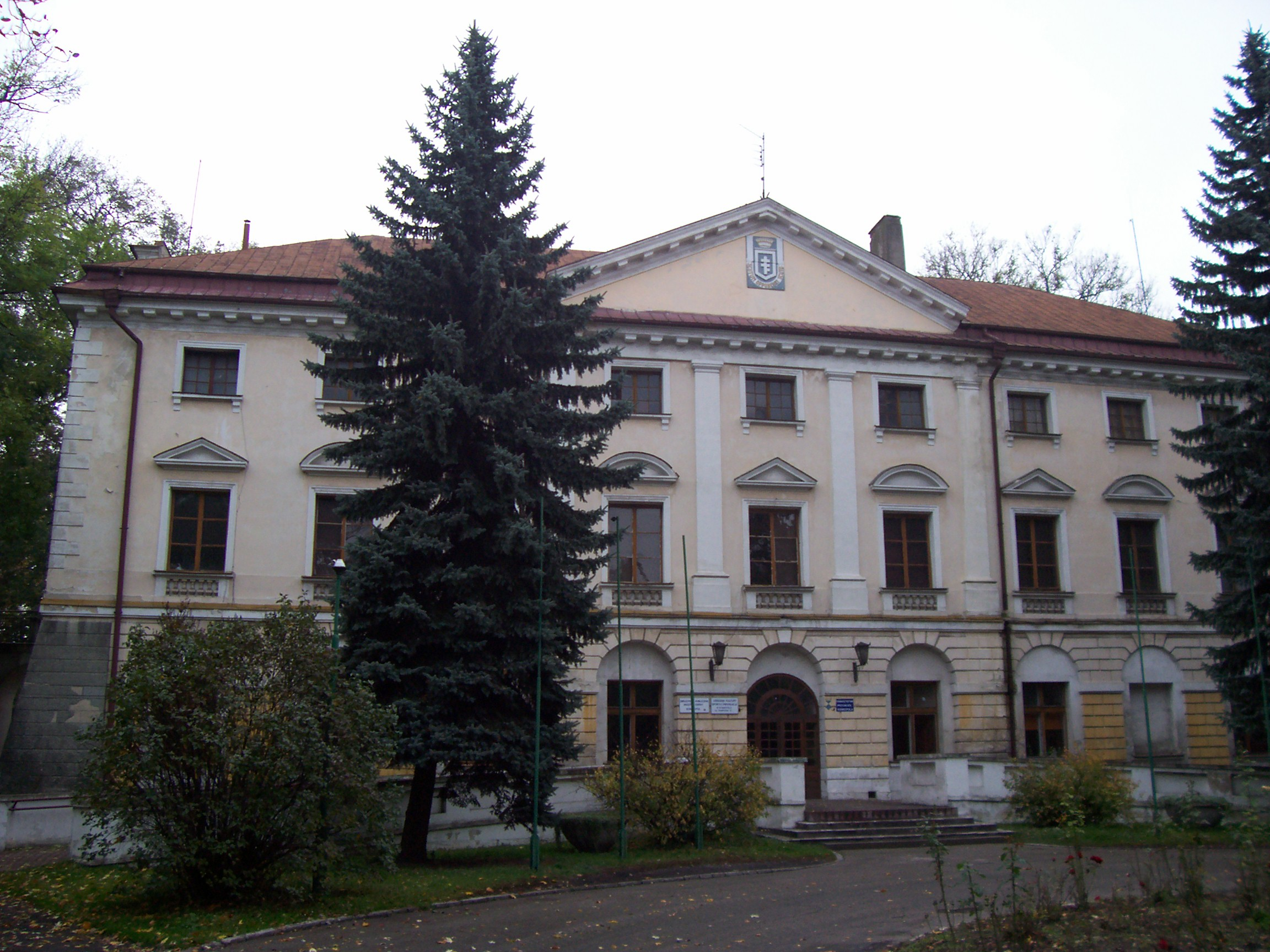 Pałac w Koniecpolu od frontu 01.1979.